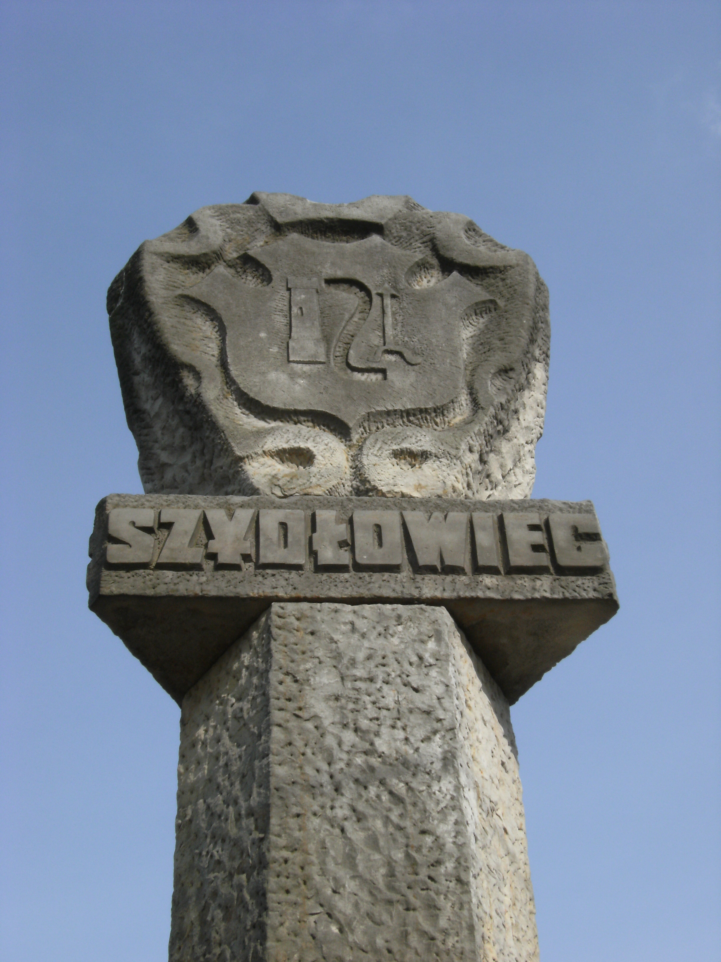 Witacz w Szydłowcu- Welcomen in Szydlowiec